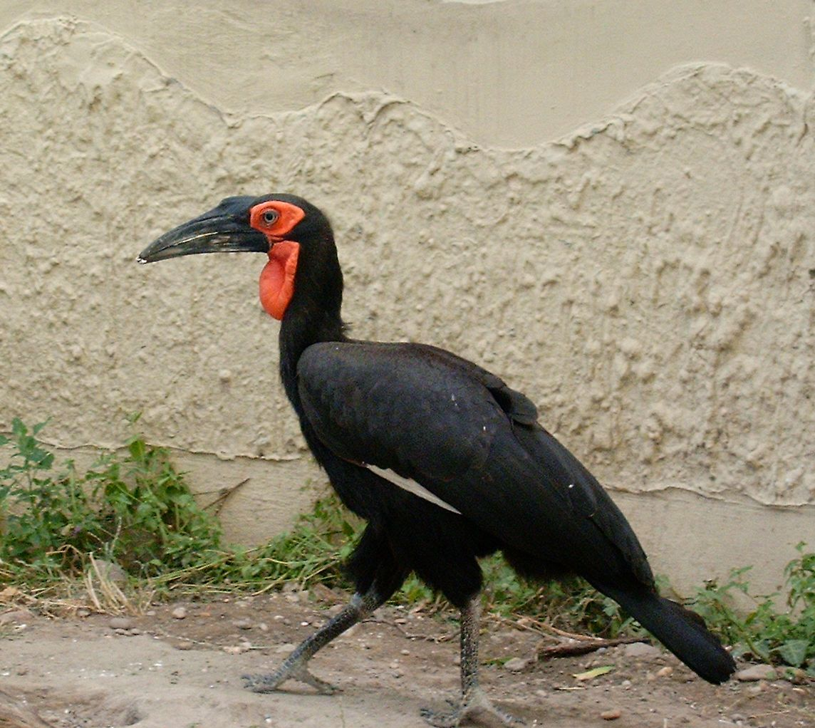 Bucorvus leadbeateri at Budapest Zoo